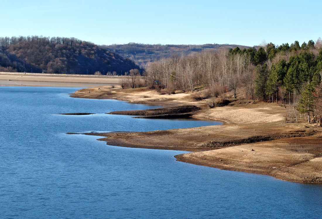 Jezero Garaši - pogled na branu